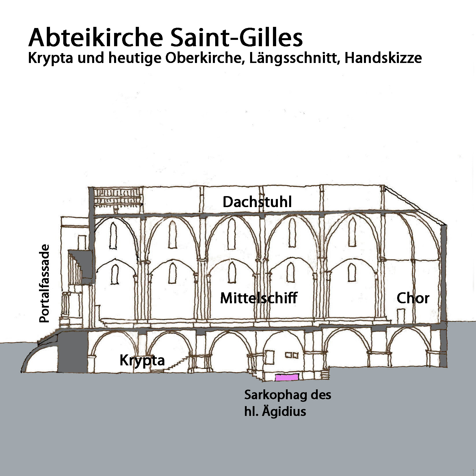 Abteikirche_Saint-Gilles,Längsschnitt, Handskizze